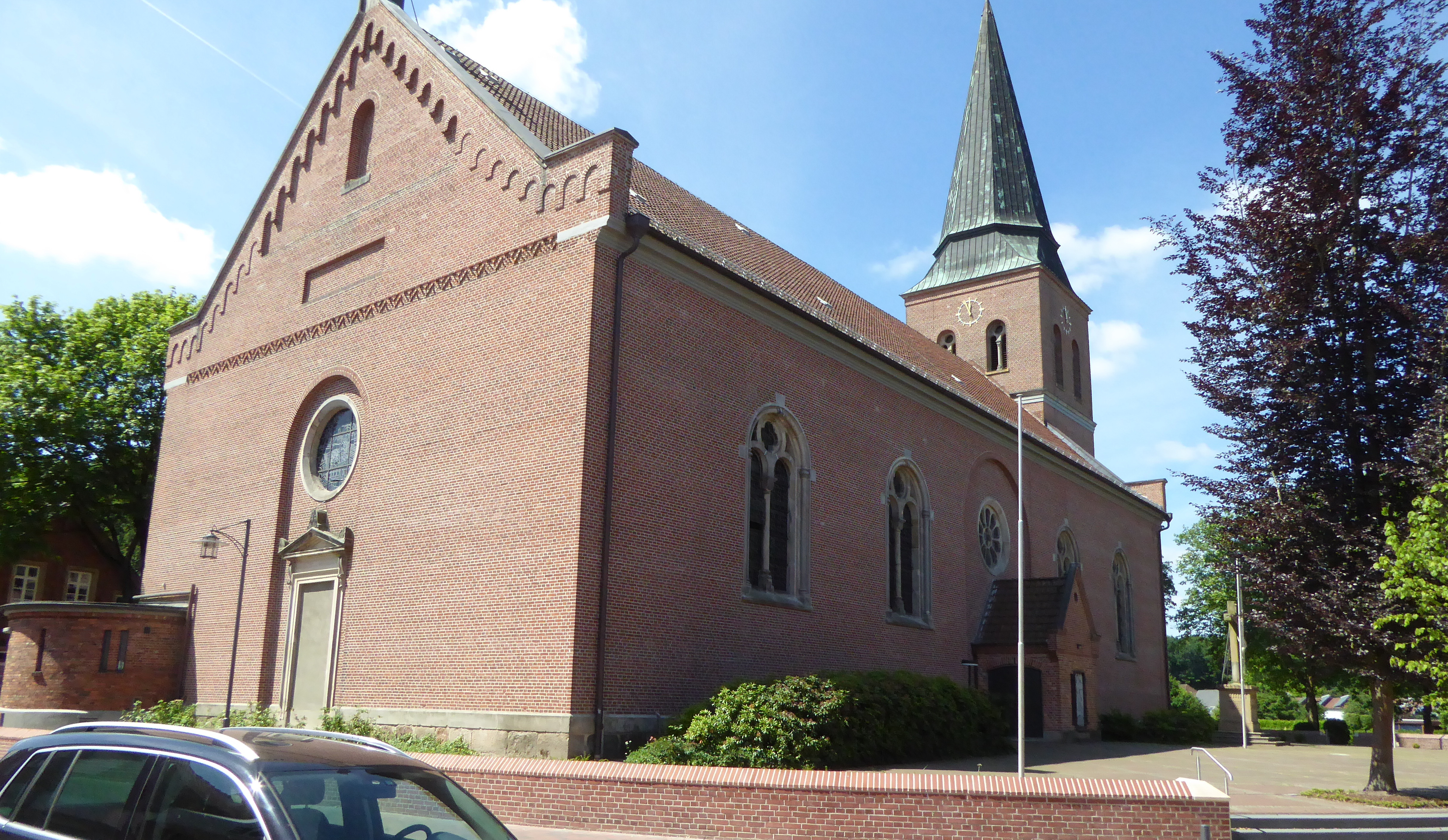 Kath. Kirche St. Sixtus in Werlte